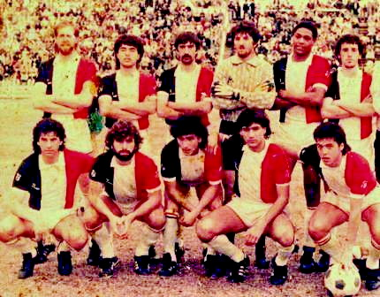 Nuevamente en el Estadio Centenario. Decada del 80.